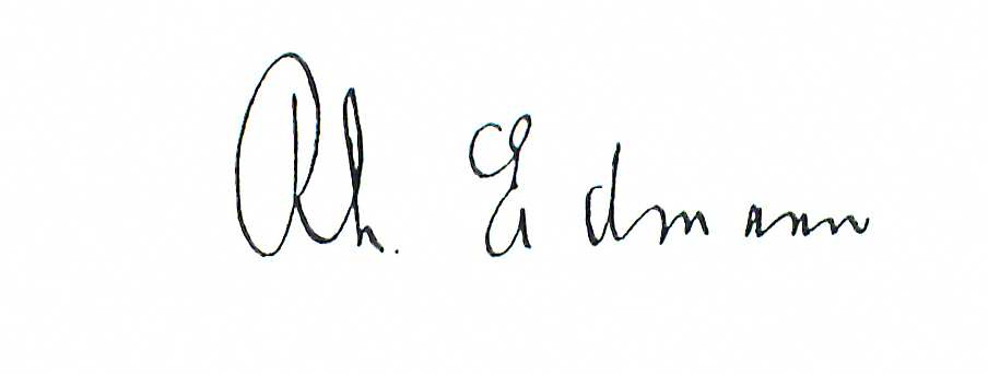 Rhoda Erdmann Signatur 1926 Unterschrift zu einer autobiographischen Skizze in Führende Frauen Europas, 2 Bände. München 1928 und 1930